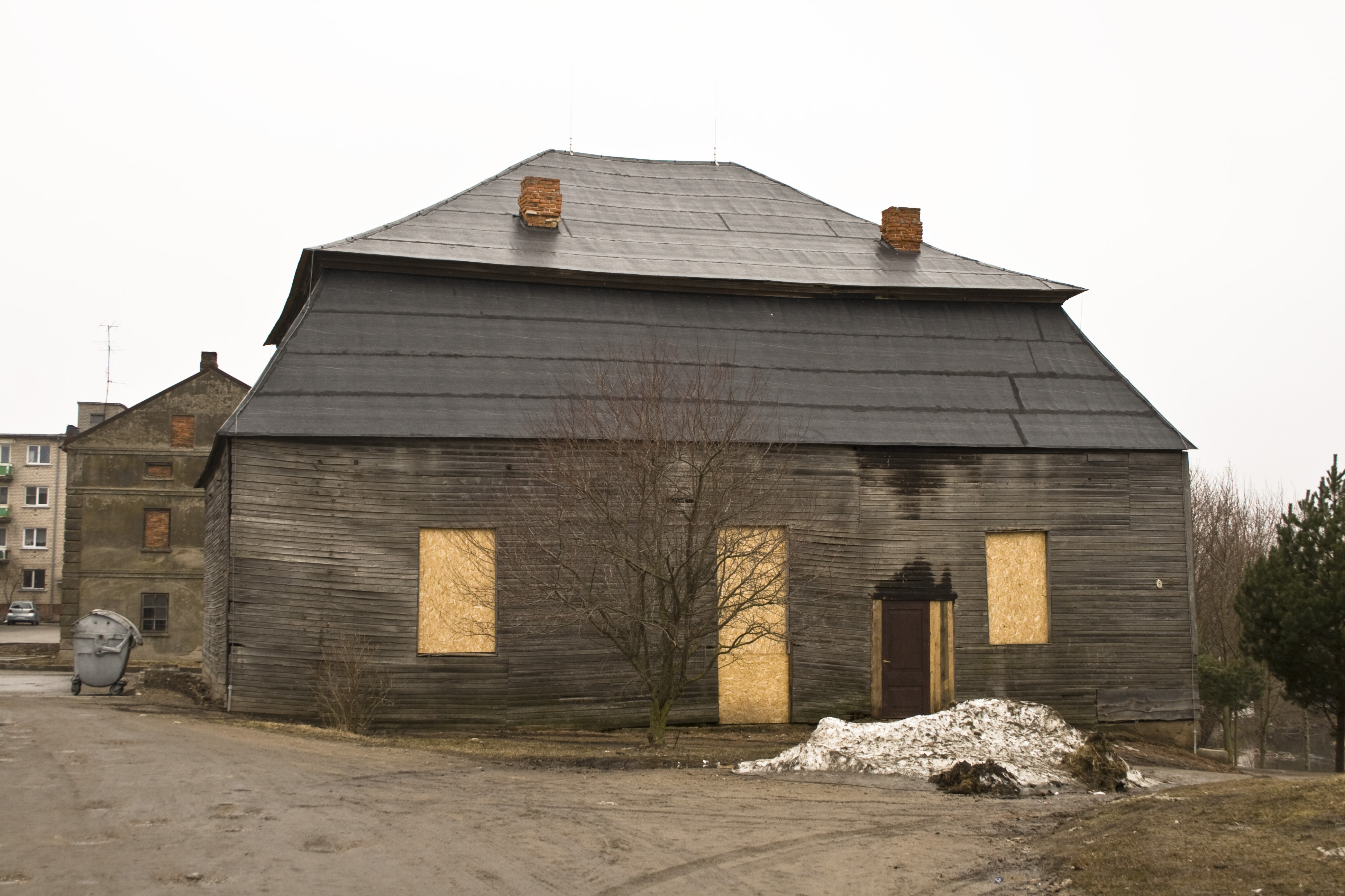 Pakruojis synagogue